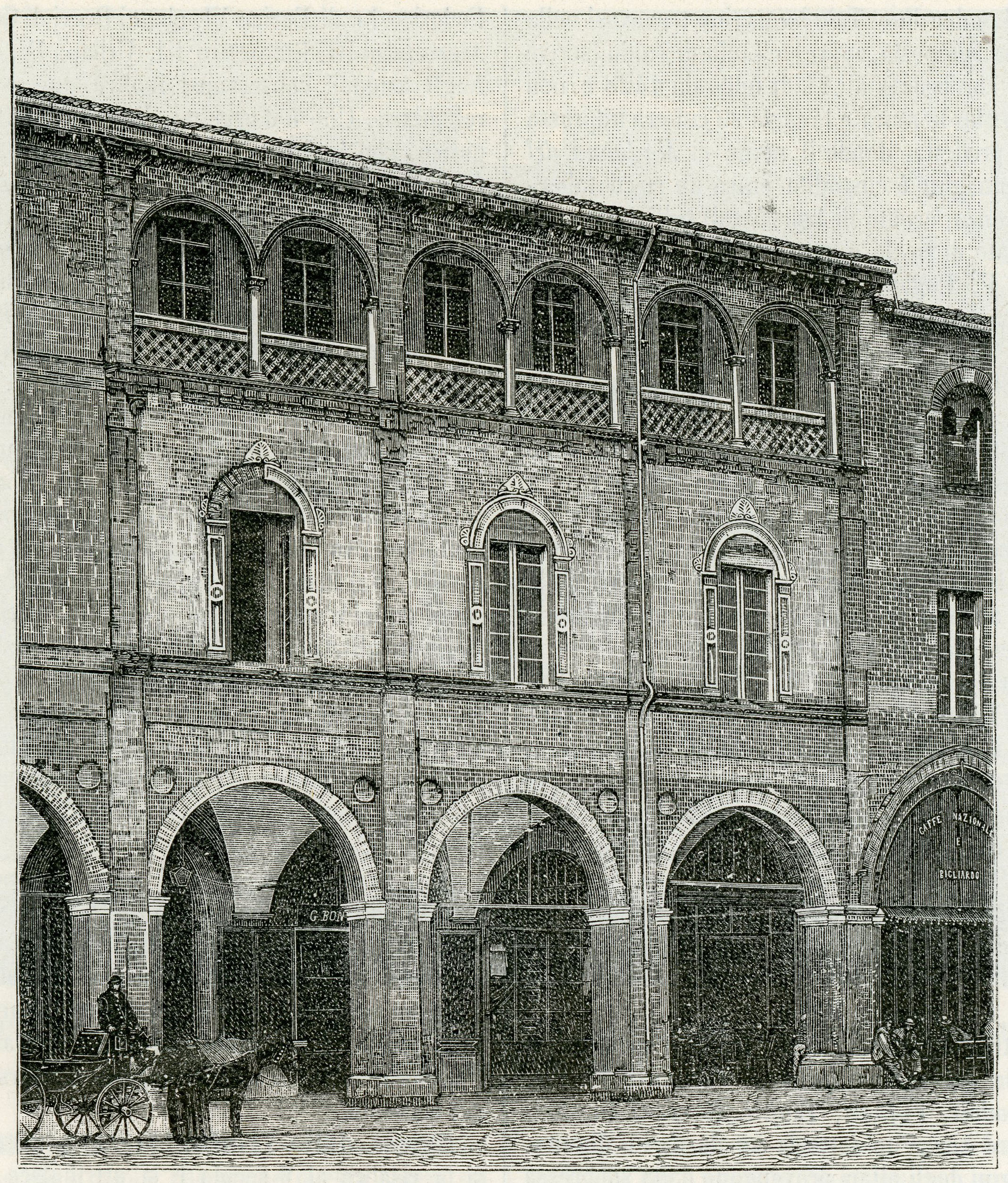 Forlì: palazzo del Podestà , (xilografia).